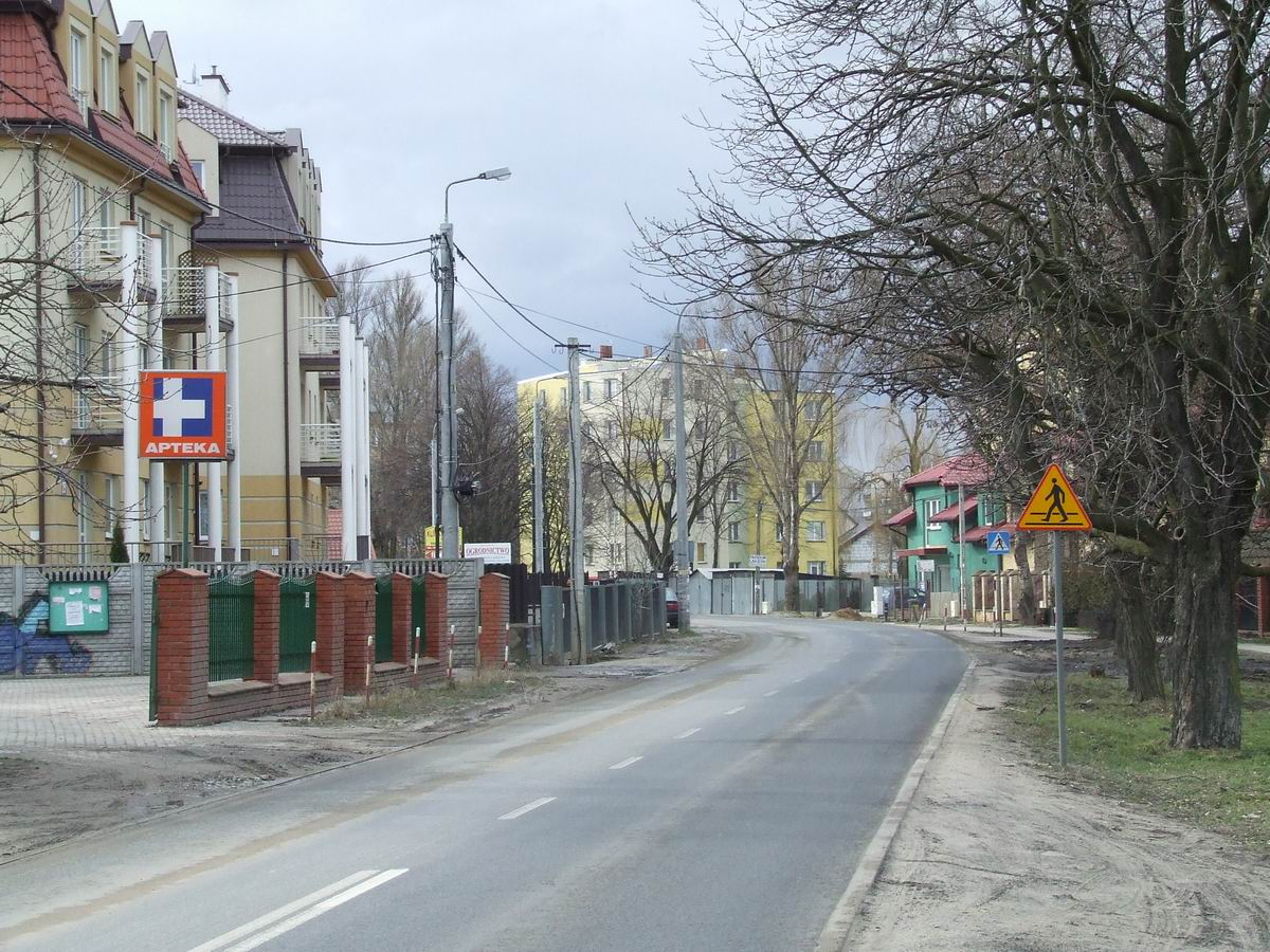 Mysiadło, nowe bloki nad stawem